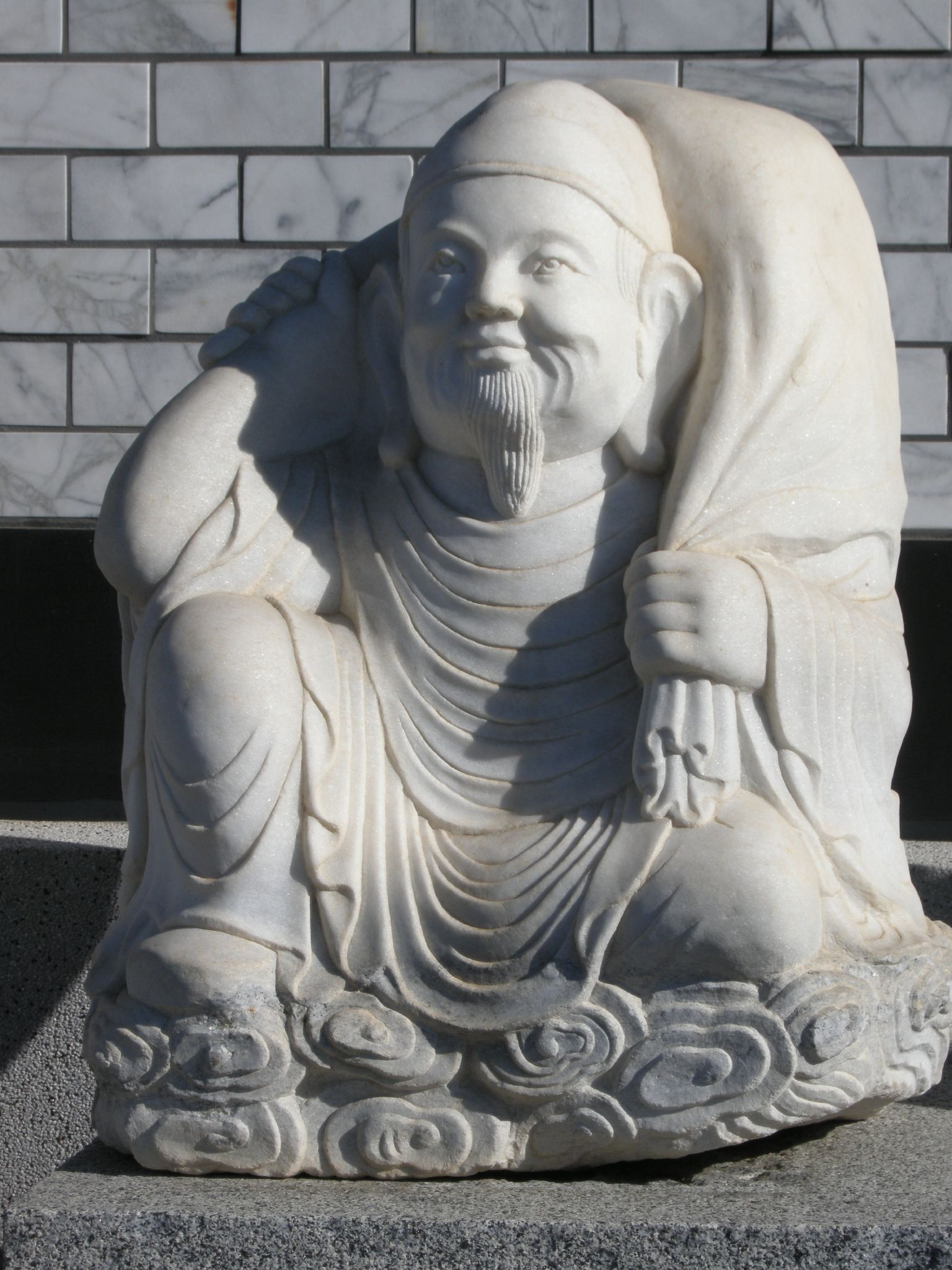 Dio del focolare, che porta un martello e dei sacchi di riso sulla schiena.